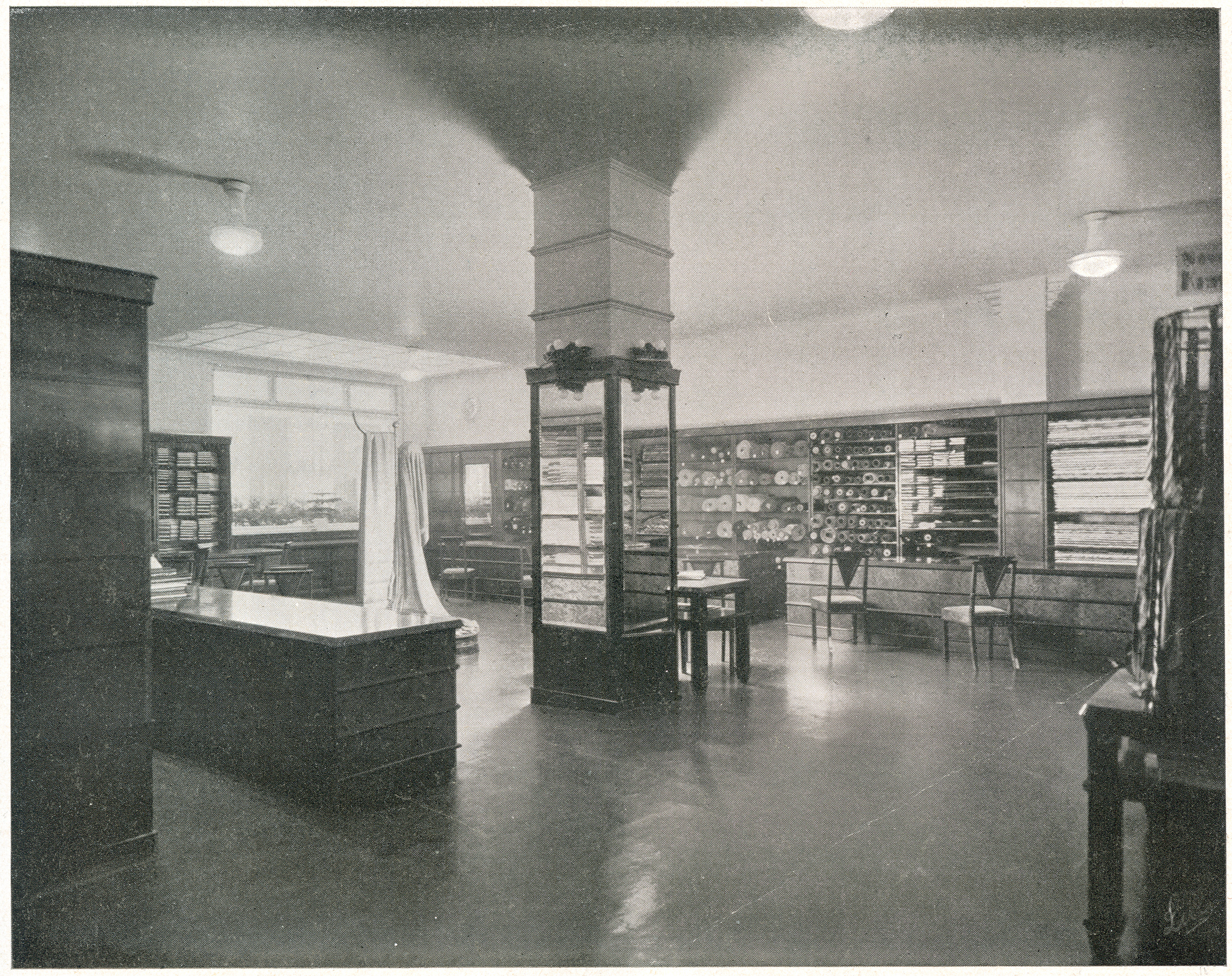 Blick in eine Abteilung der Verkaufsräume vom Seidenhaus Koopmann in Hannover, Georgstraße 13-14 ...